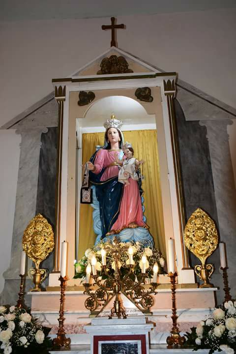 La statua lignea della Vergine